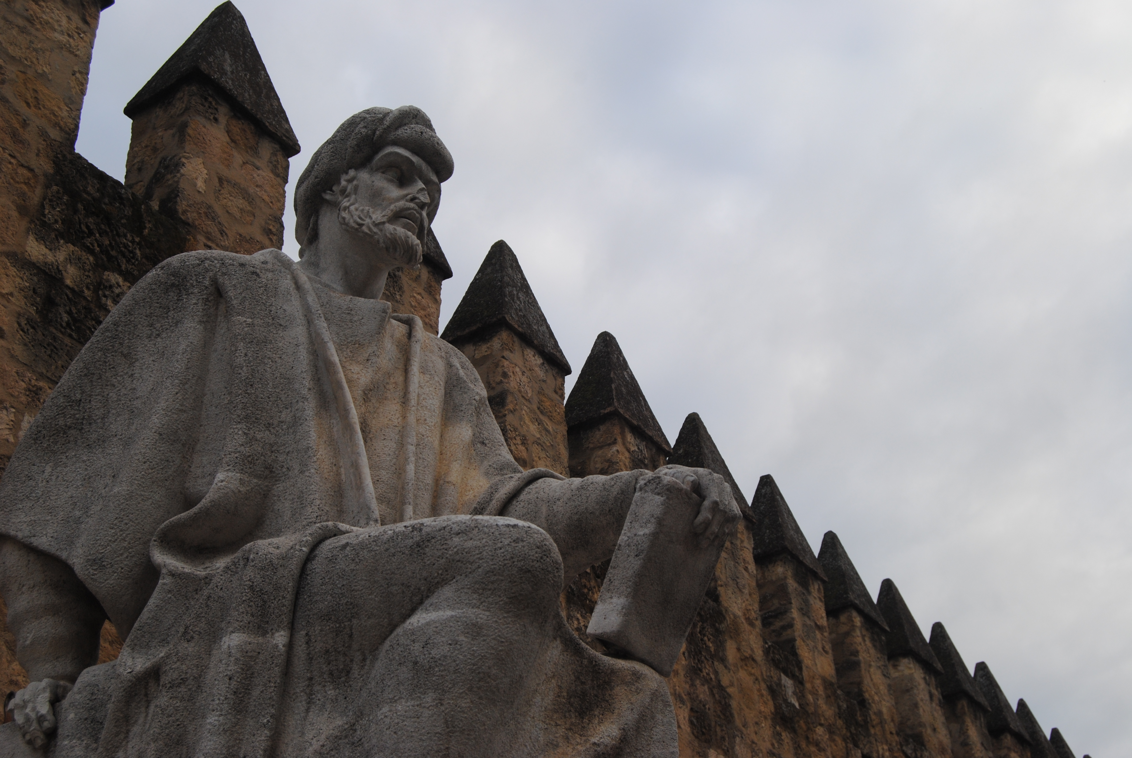 Viaje a Córdoba. Fin de semana 10-11 de Noviembre de 2012 Foto usada en la noticia